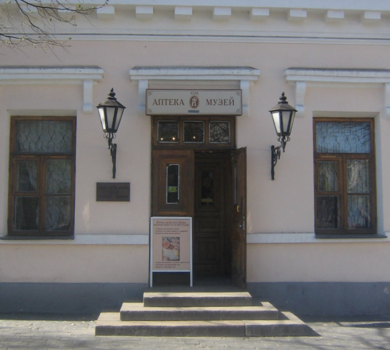 Фасад музею-аптеки в Києві